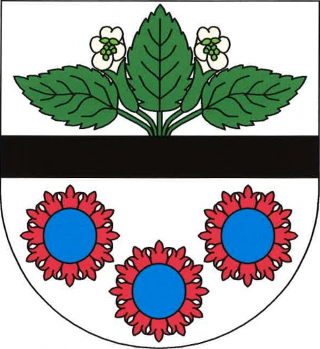 znak, Doubravice, okres Trutnov